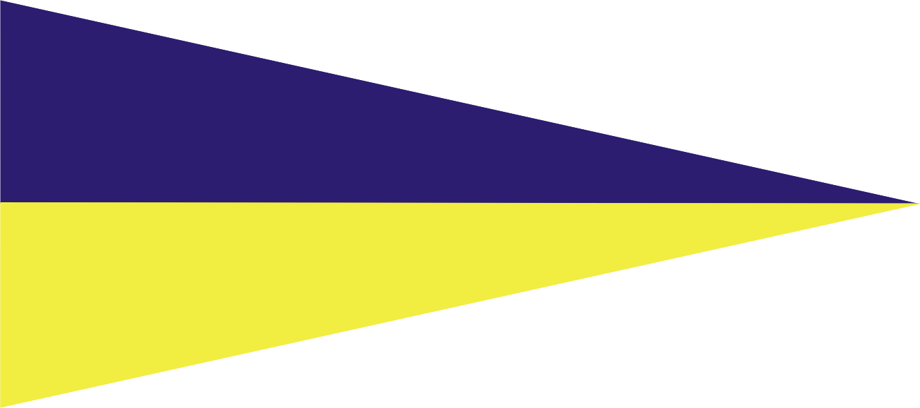 LWP proporczyk piechoty